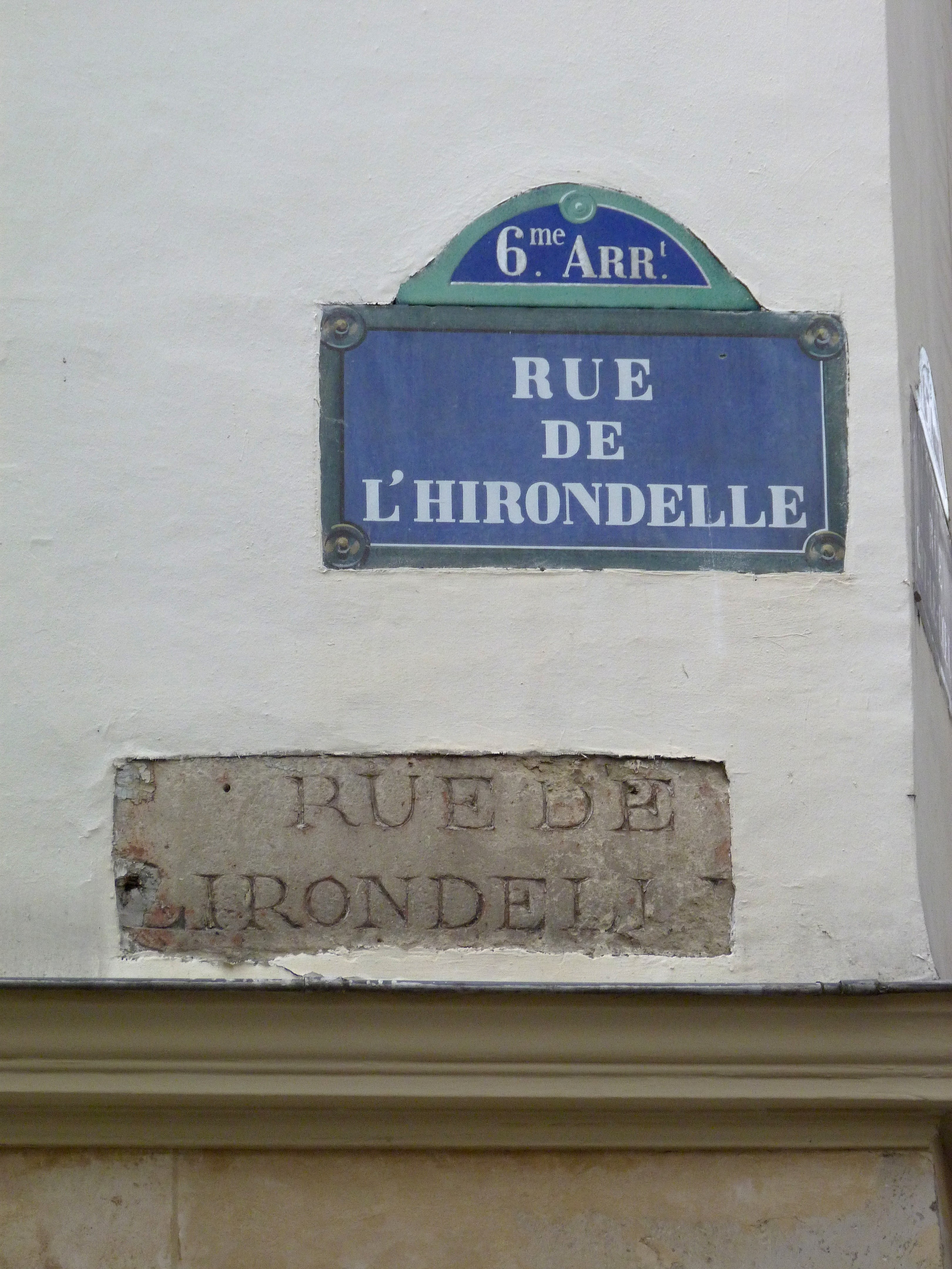 Plauque et inscription ancienne au coin de la rue de l'Hirondelle et de la rue Gît-le-Coeur (Paris, 6e arrond).